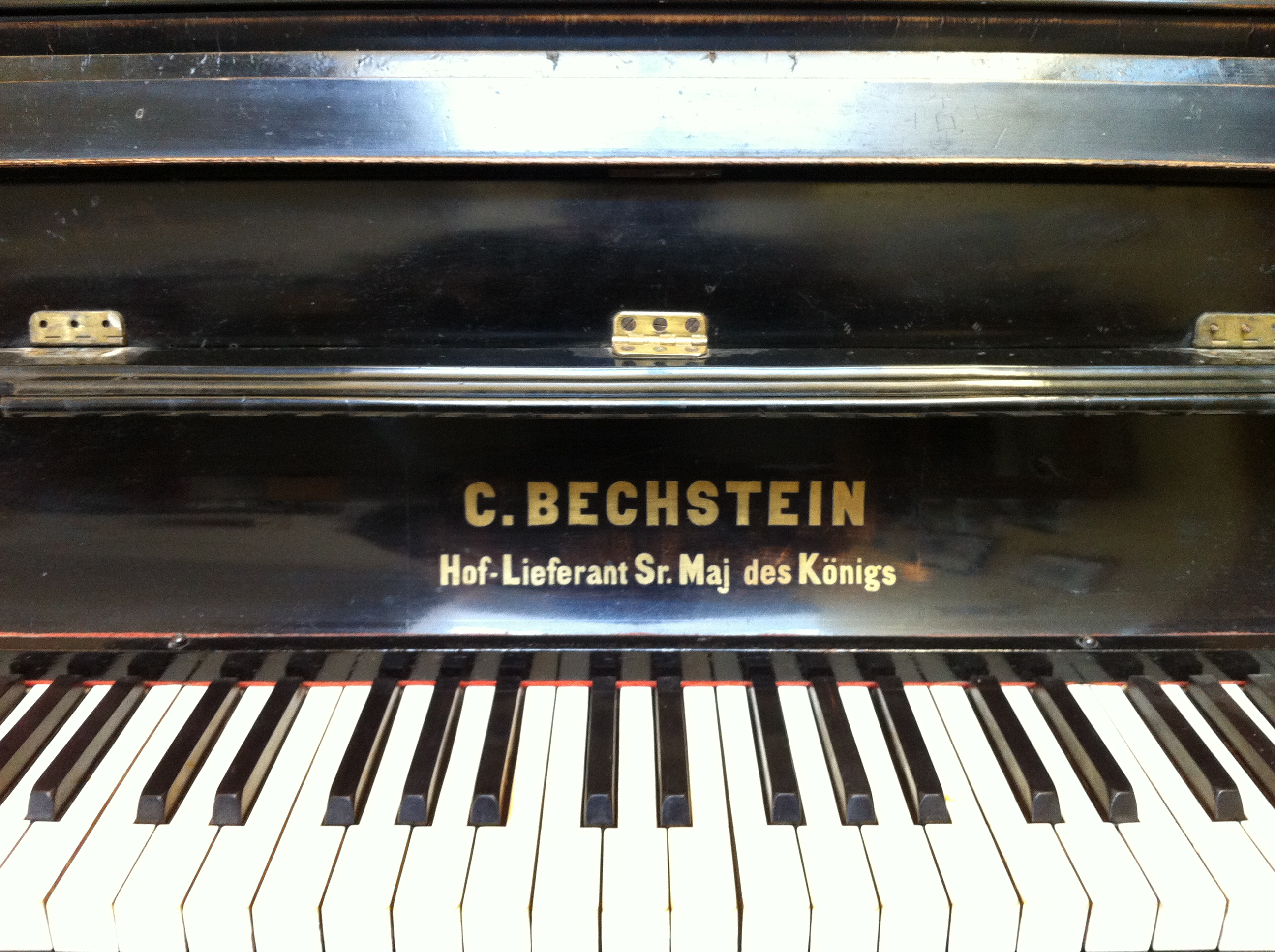 Bechsteinschriftzug 1870, Piano Seriennummer 4301